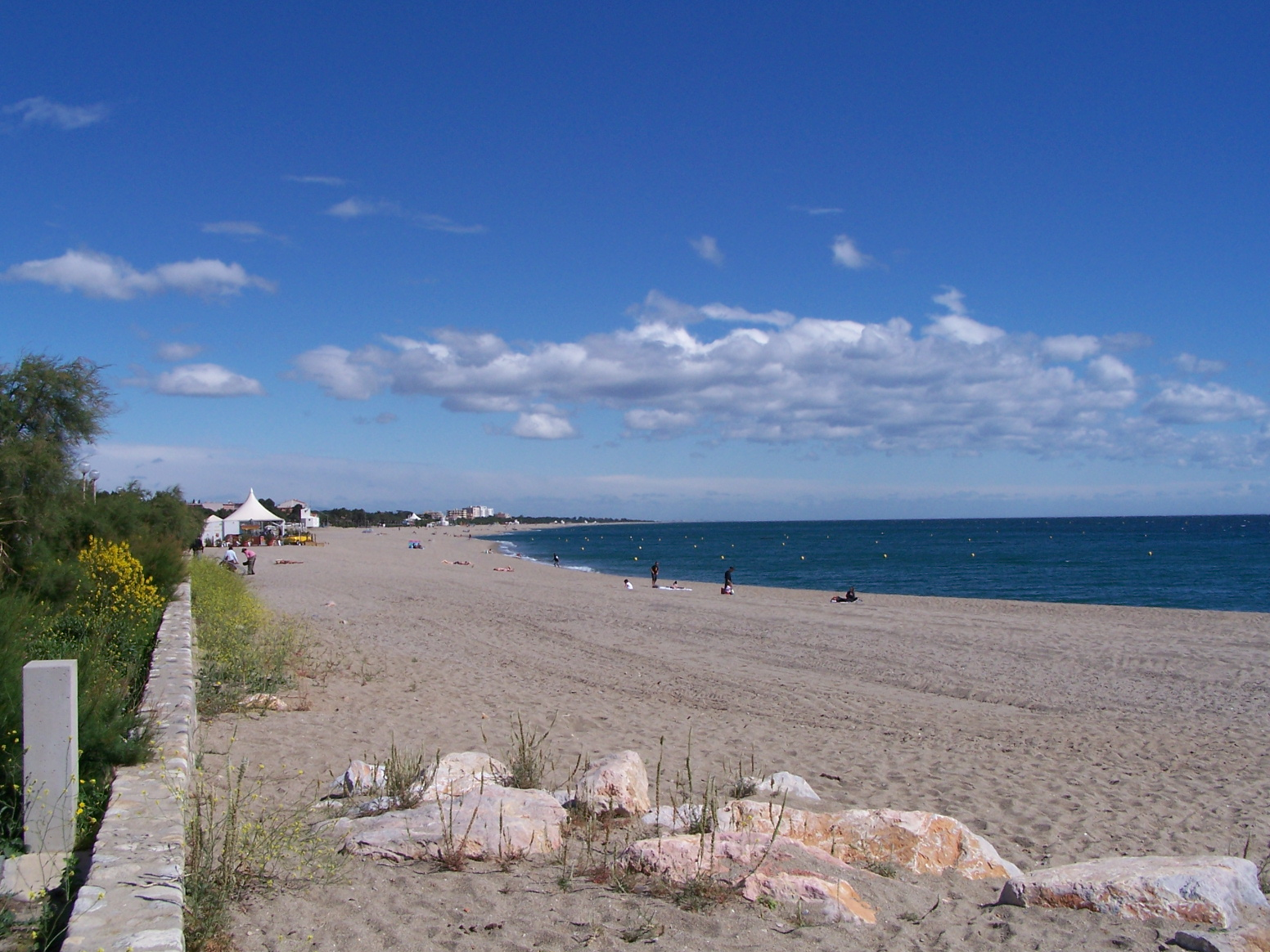 Plage d'Argeles sur mer